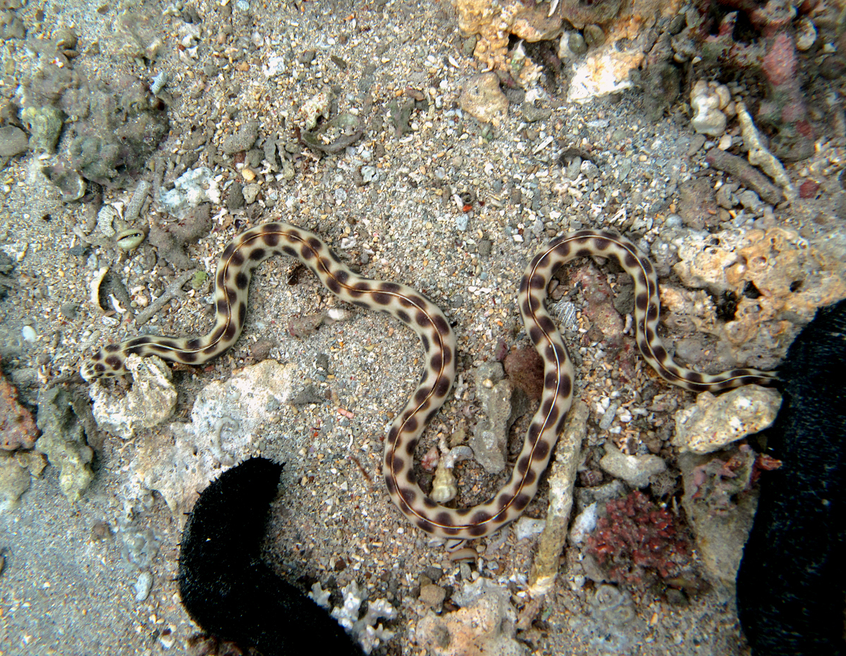 Une Anguille-serpent maculée (Myrichthys maculosus) à la Réunion.